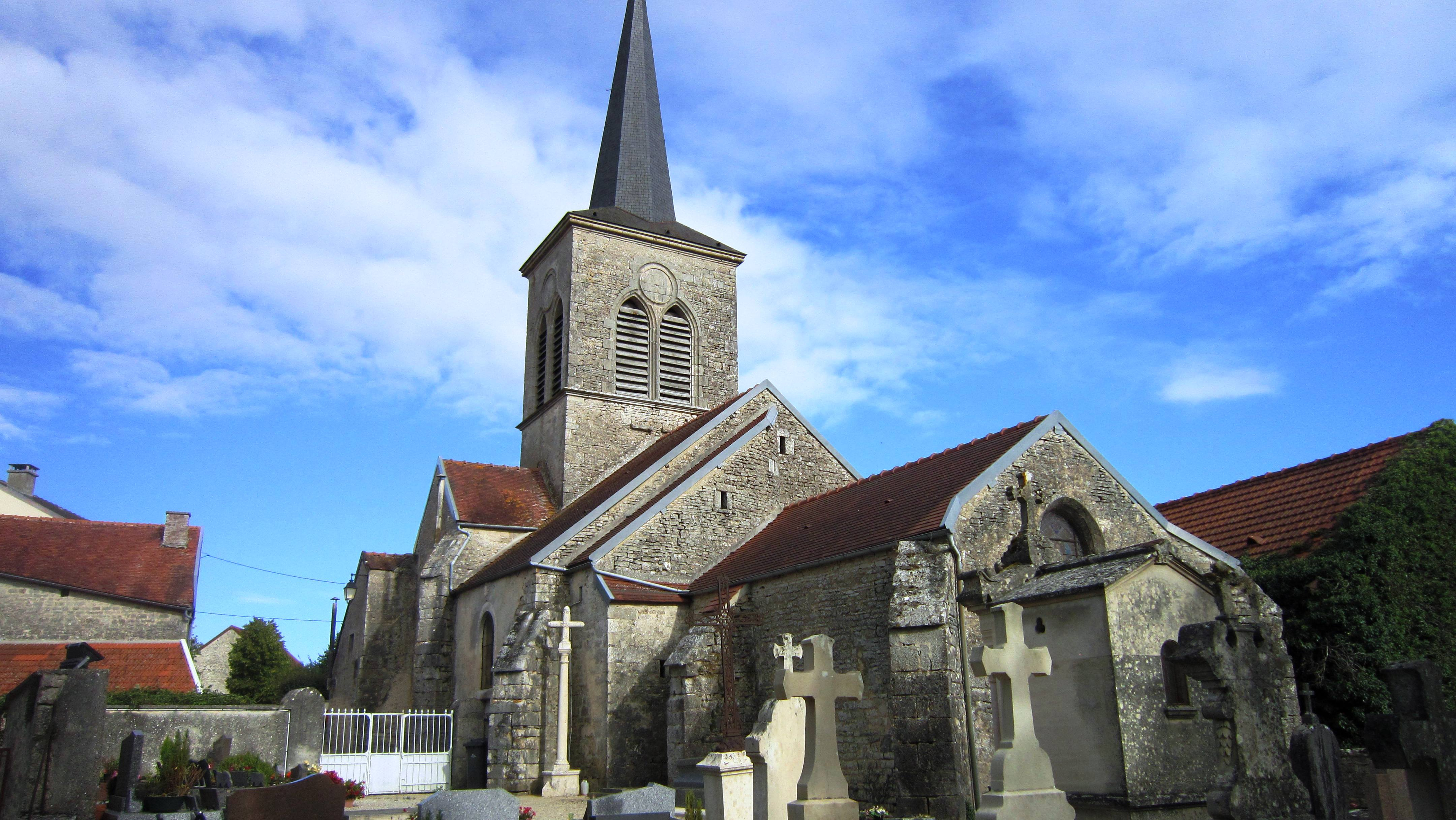 Eglise de Bissey-la-Pierre (Côte-d'Or)